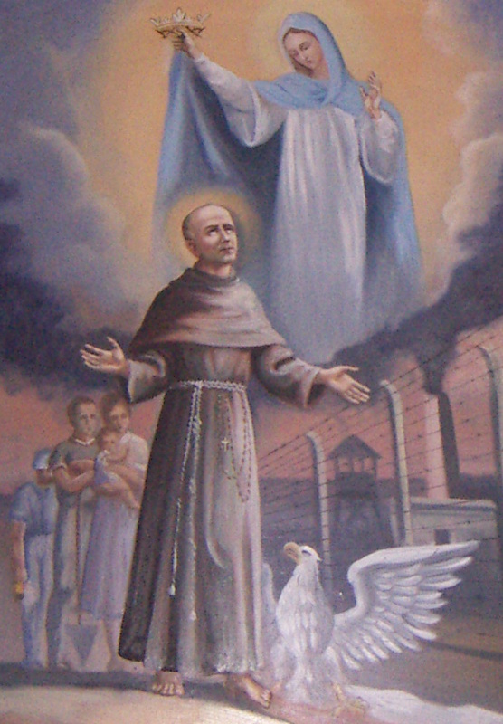 Siedlęcin, kościół ewangelicki, ob. rzym.-kat. pom. p.w. Matki Boskiej Nieustającej Pomocy, XVIII